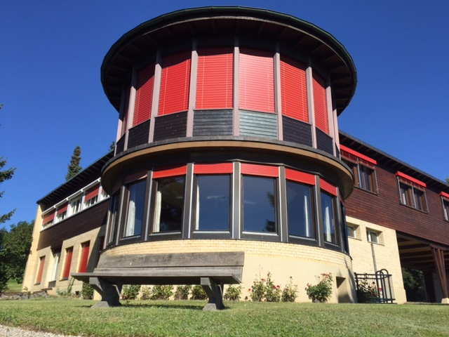 Nationale Gedenkstätte für Heim- und Verdingkinder